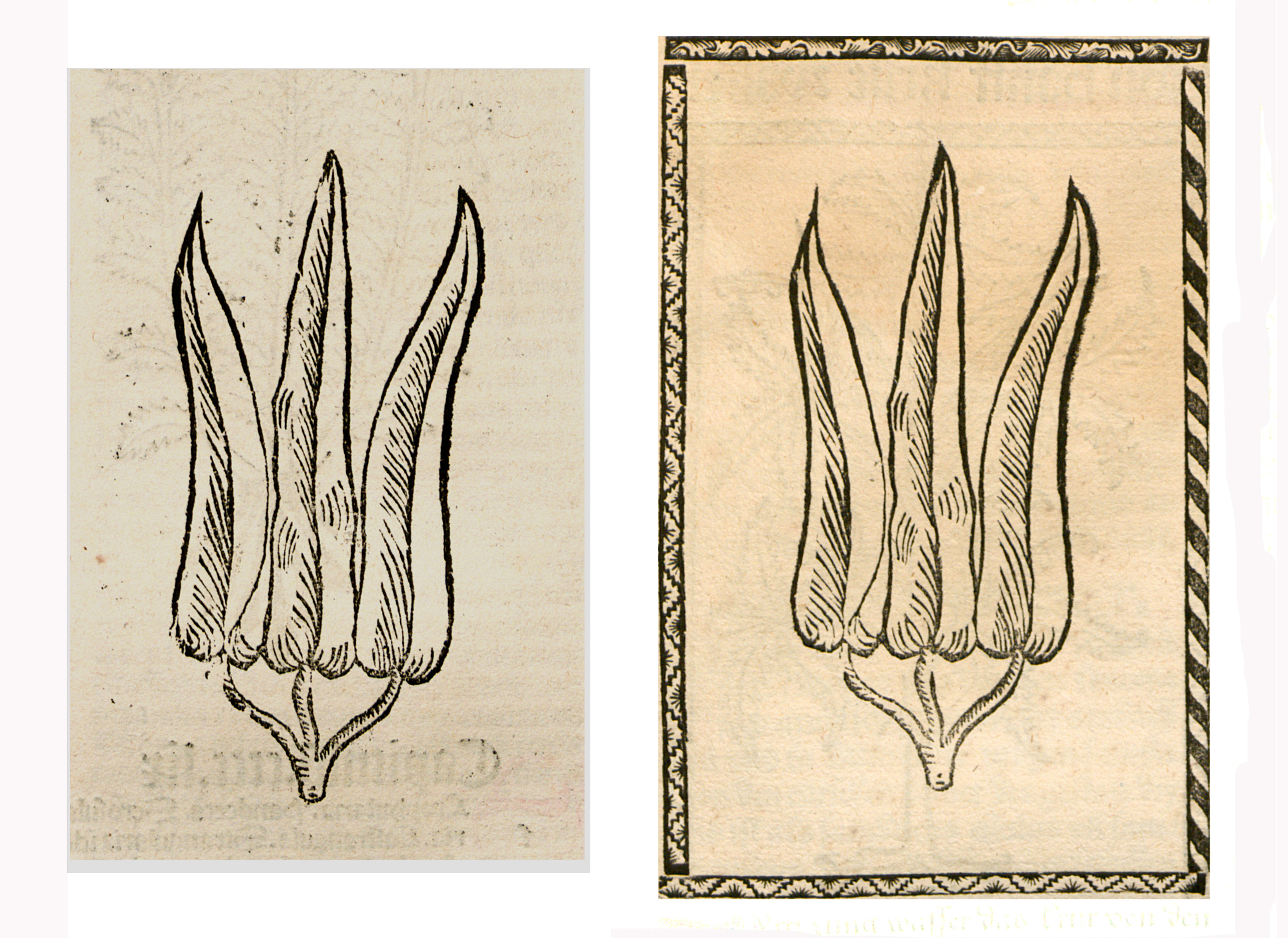 Abbildung von: Hyrtz Zung (Phyllitis scolopendrium)